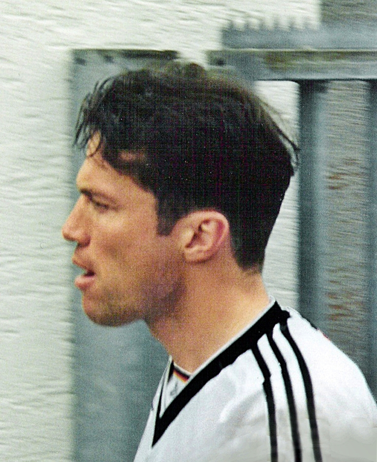 Lothar Matthäus, Training der Nationalmannschaft bei Bonn